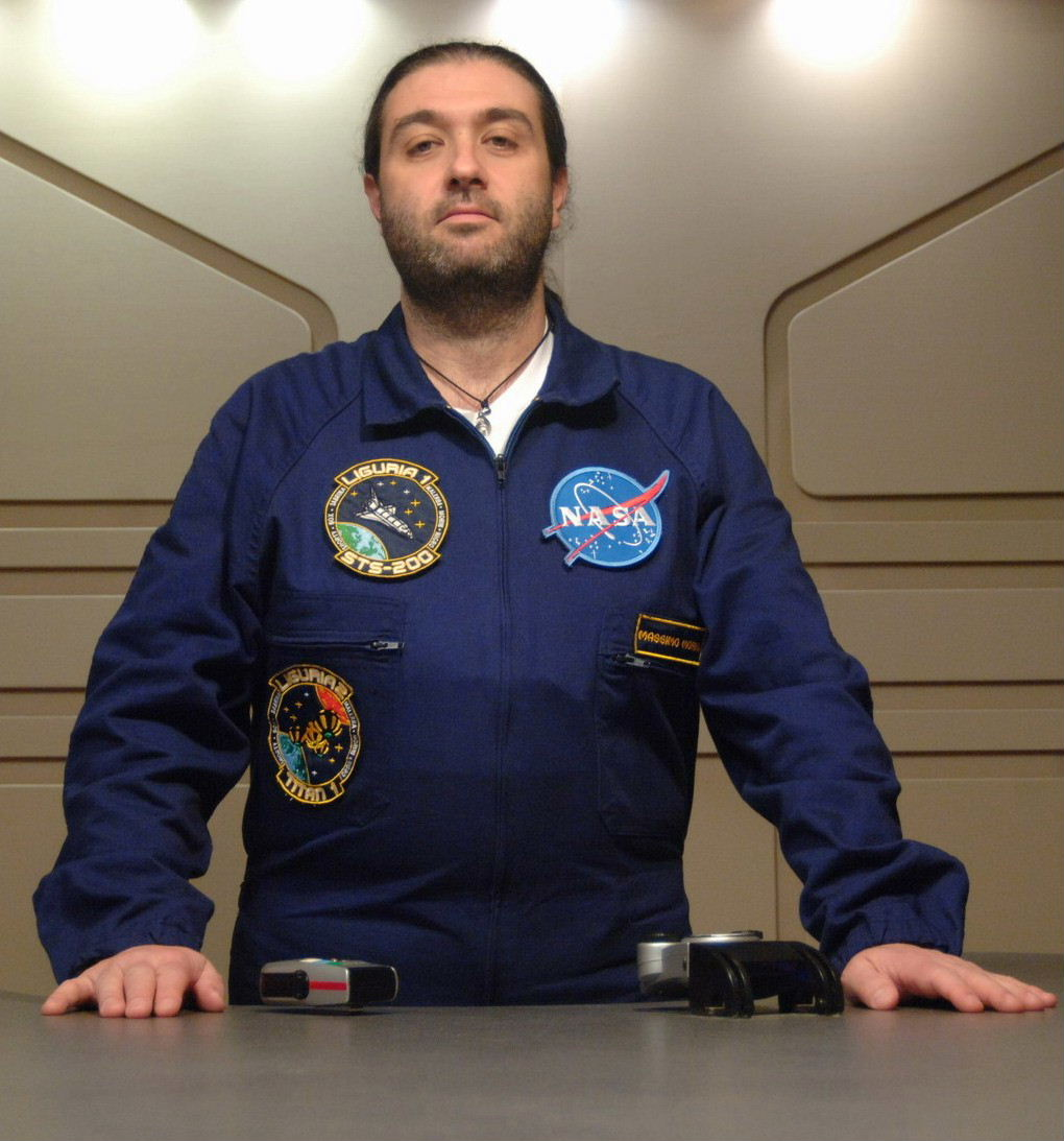 Immagine del cantante e musicista Massimo Morini fornita dallo stesso artista per Commons